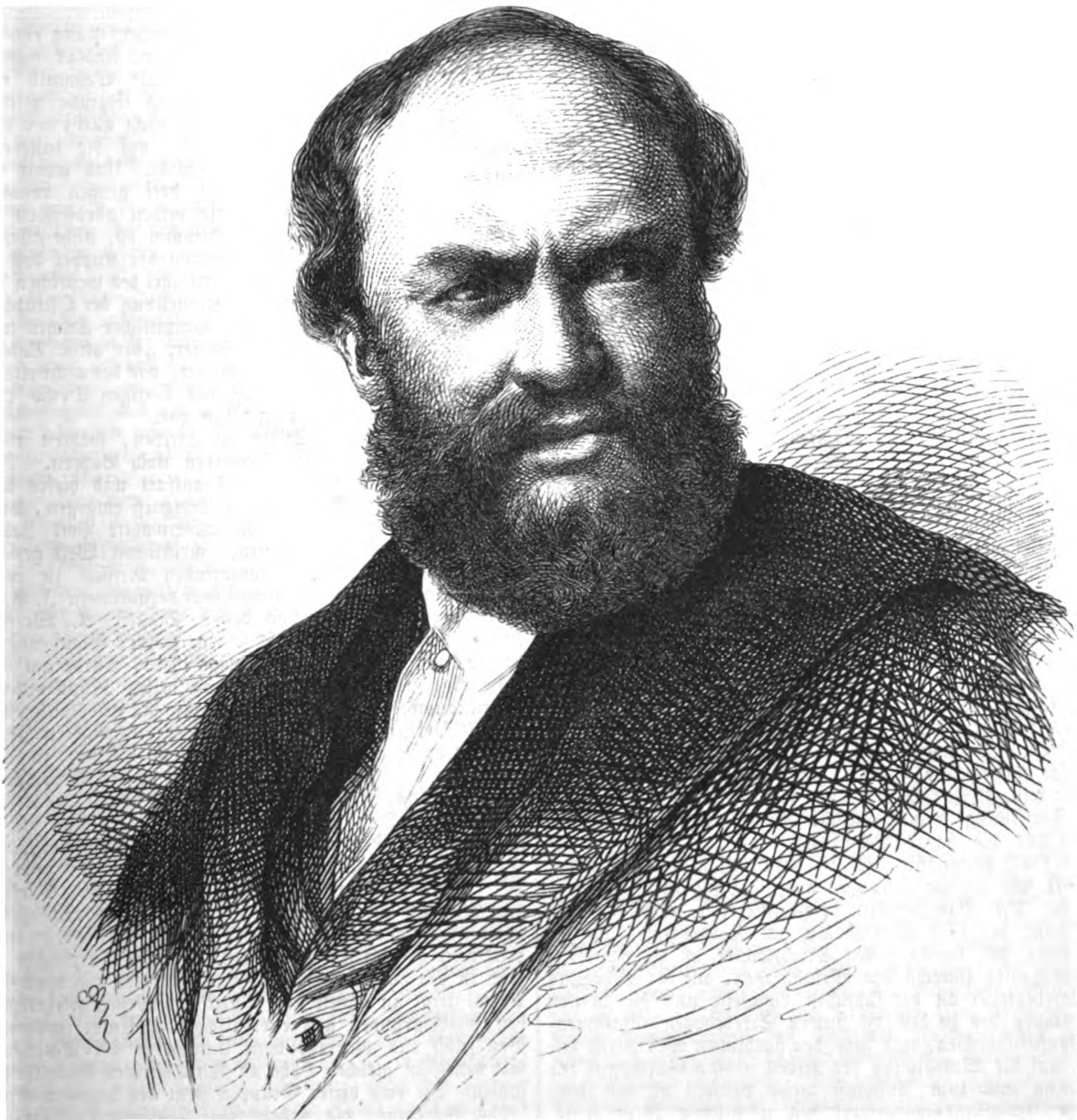 Bonaventura Genelli, deutscher Maler im 19. Jh.